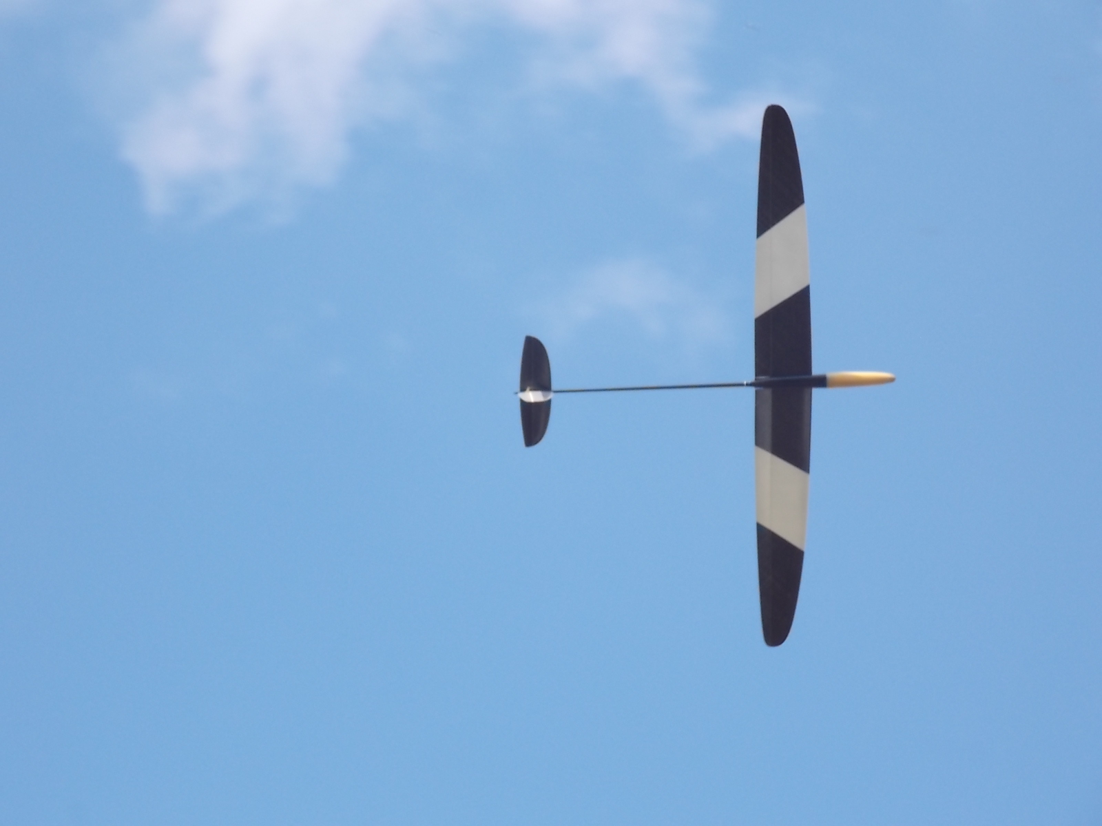 Політ моделі ракетного планера на тривалість польоту й точність посадки S8E/P. Чемпіонат Європи 2015, м.Львів